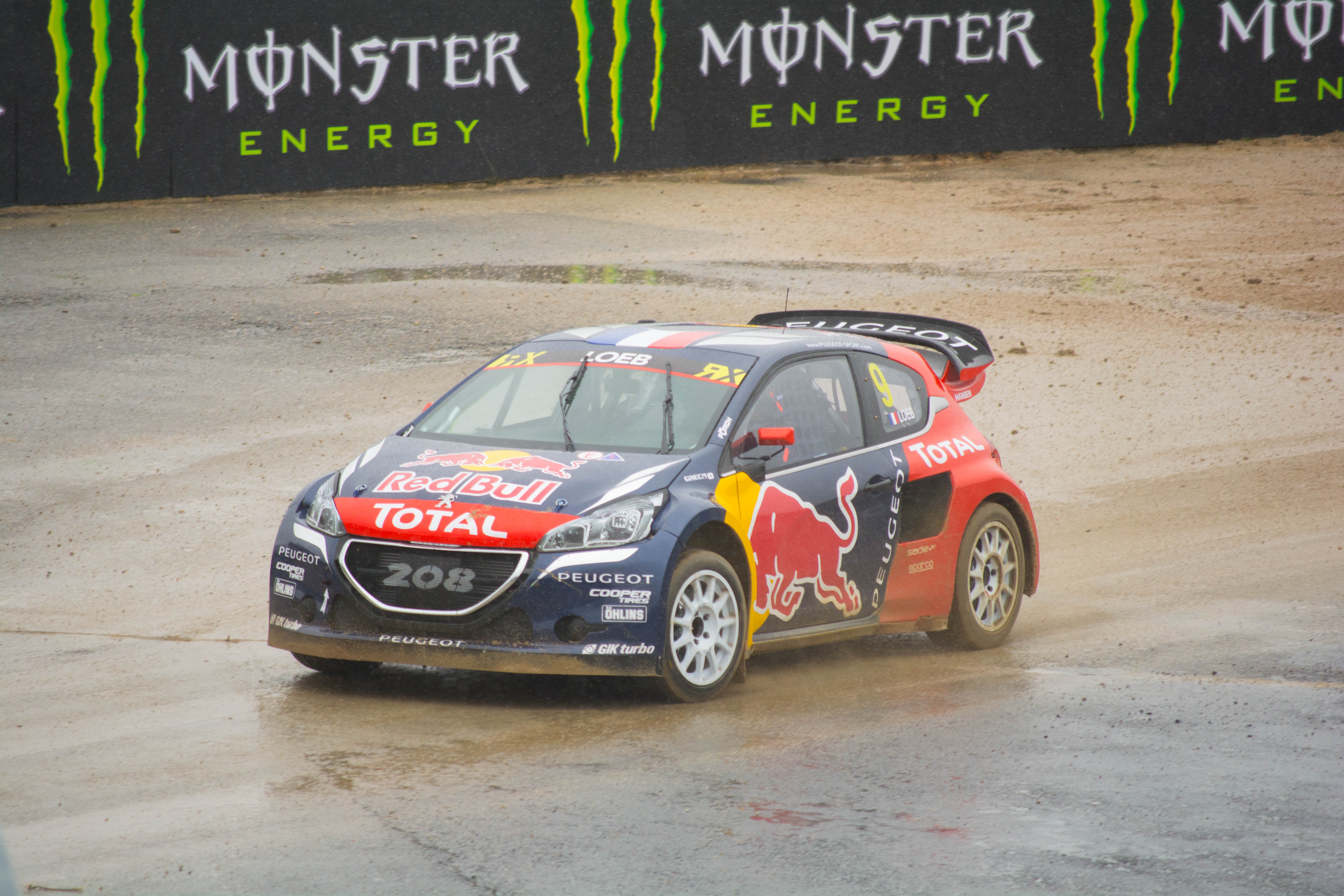 Sesiones de prueba